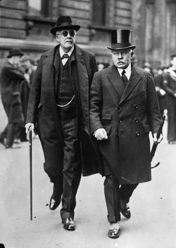 Lord Balfour im Alter von 81 Jahren in London gestorben! Unser Bild zeigt Lord Balfour (links mit Brille) auf dem Wege zum Parlamant.